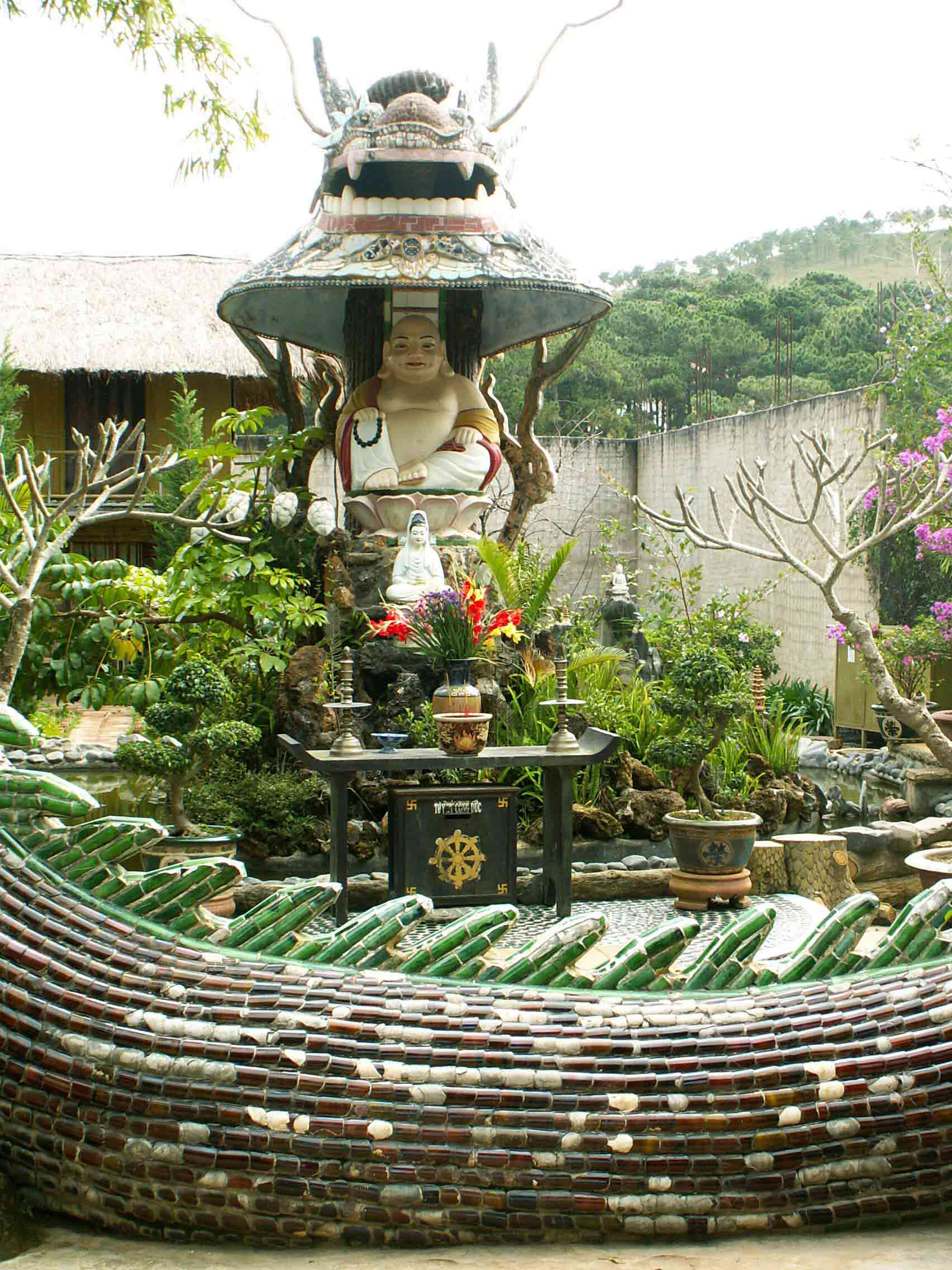 Rồng trong Hoa Long Viên của Chùa Linh Phước, Đà Lạt. Hình này do Phan Ba tự chụp vào tháng 12 năm 2005 và đưa vào phạm vi công cộng.